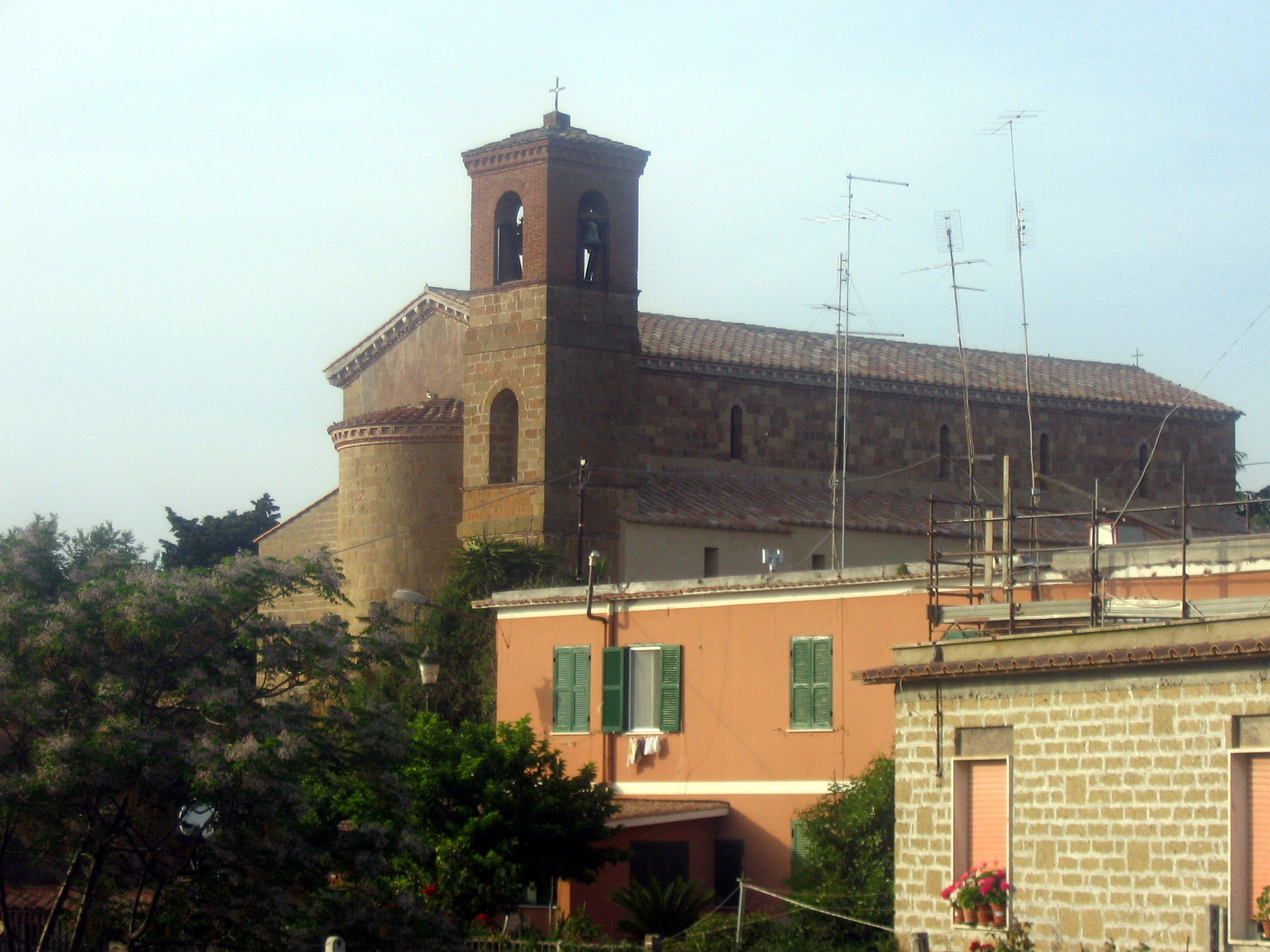 Ardea, Lazio